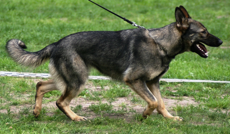 Deutscher Schäferhund "Graffiti" aus der Zuchtstätte "vom Neuenkirchenerdeich" (Homepage